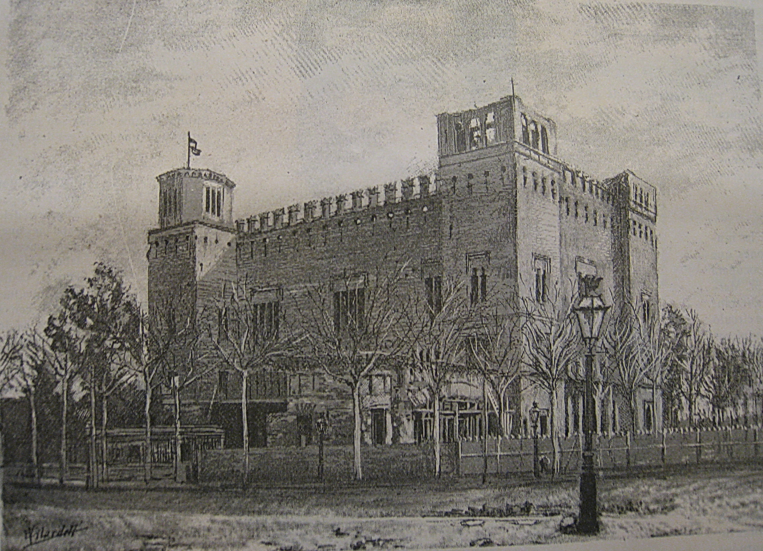 Estat de l'edificació del Castell dels Tres Dragons (futur restaurant de l'exposició) a Abril de 1888.